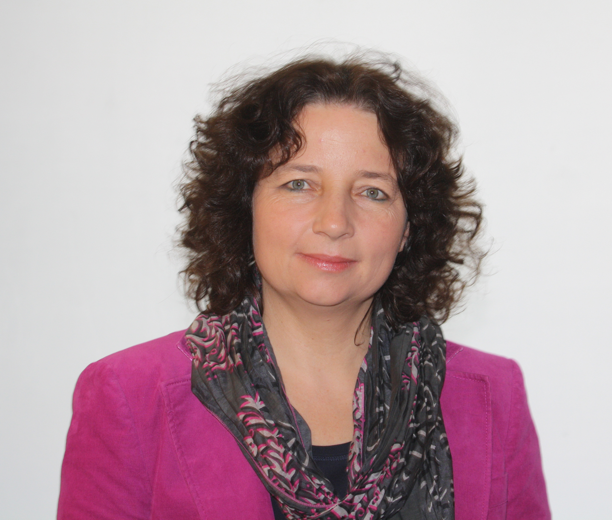 Ruth Müller, deutsche Politikerin (SPD) und Abgeordnete im Bayerischen Landtag, aufgenommen in den Fraktionsräumen der SPD am 11. Dezember 2013.